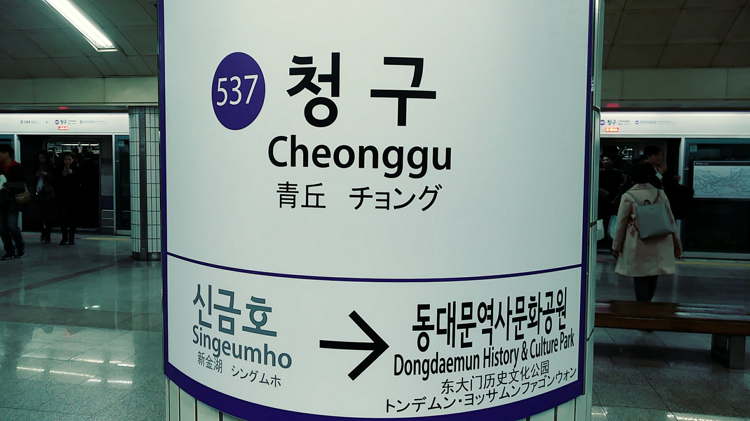 2018년 3월 14일 청구역 기둥형 역명판. 역번호 537이 추가되었다